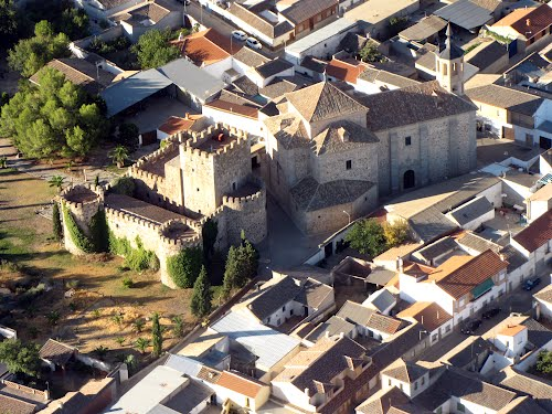 Castillo Juan de Padilla e Iglesia Mascaraque (Castle of Juan de Padilla and Mascaraque Church)